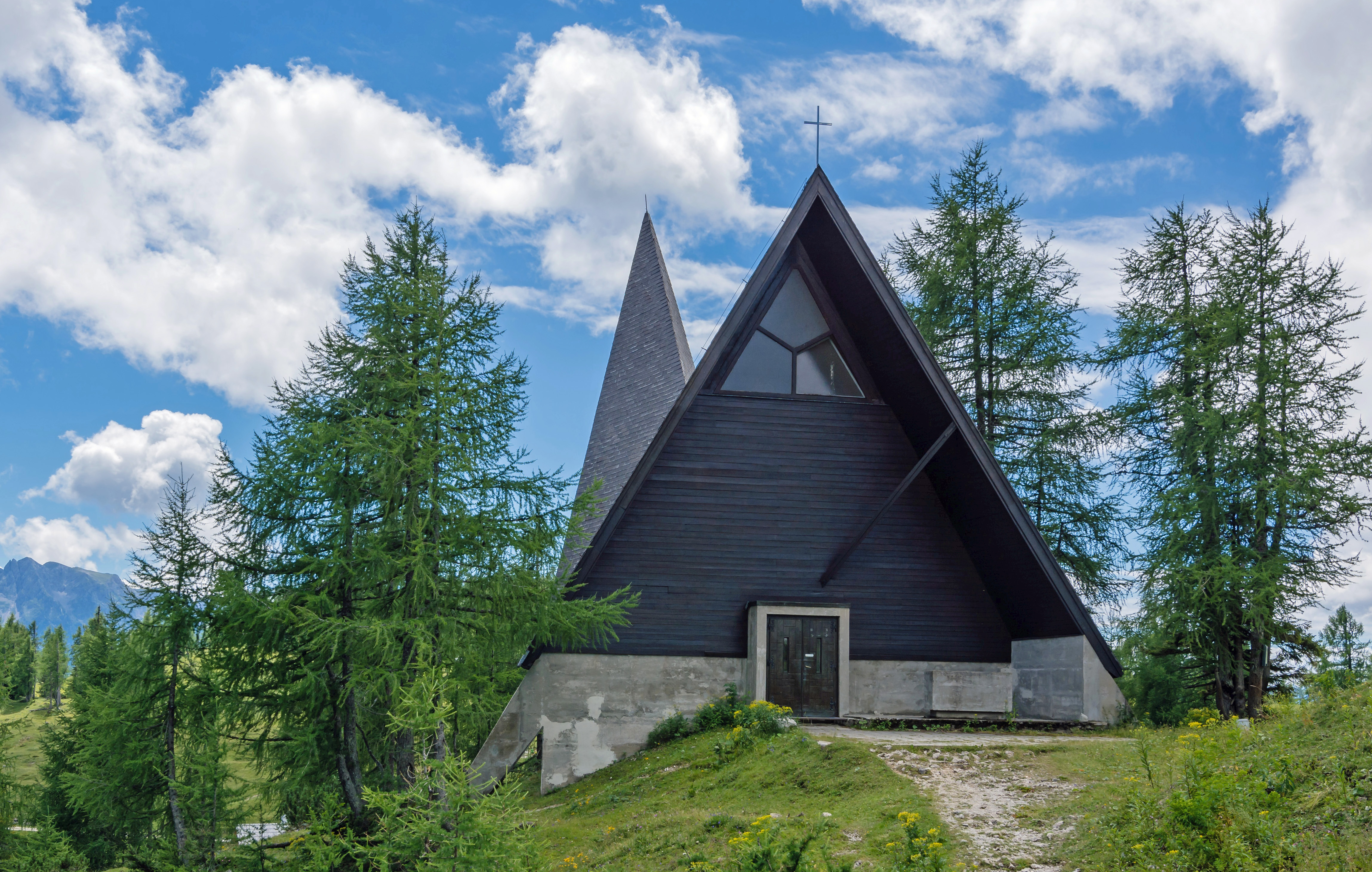 Die Filialkirche auf der Tauplitzalm ist der Hl. Dreifaltigkeit geweiht. Sie wurde in den Jahren 1961 bis 1963 errichtet.